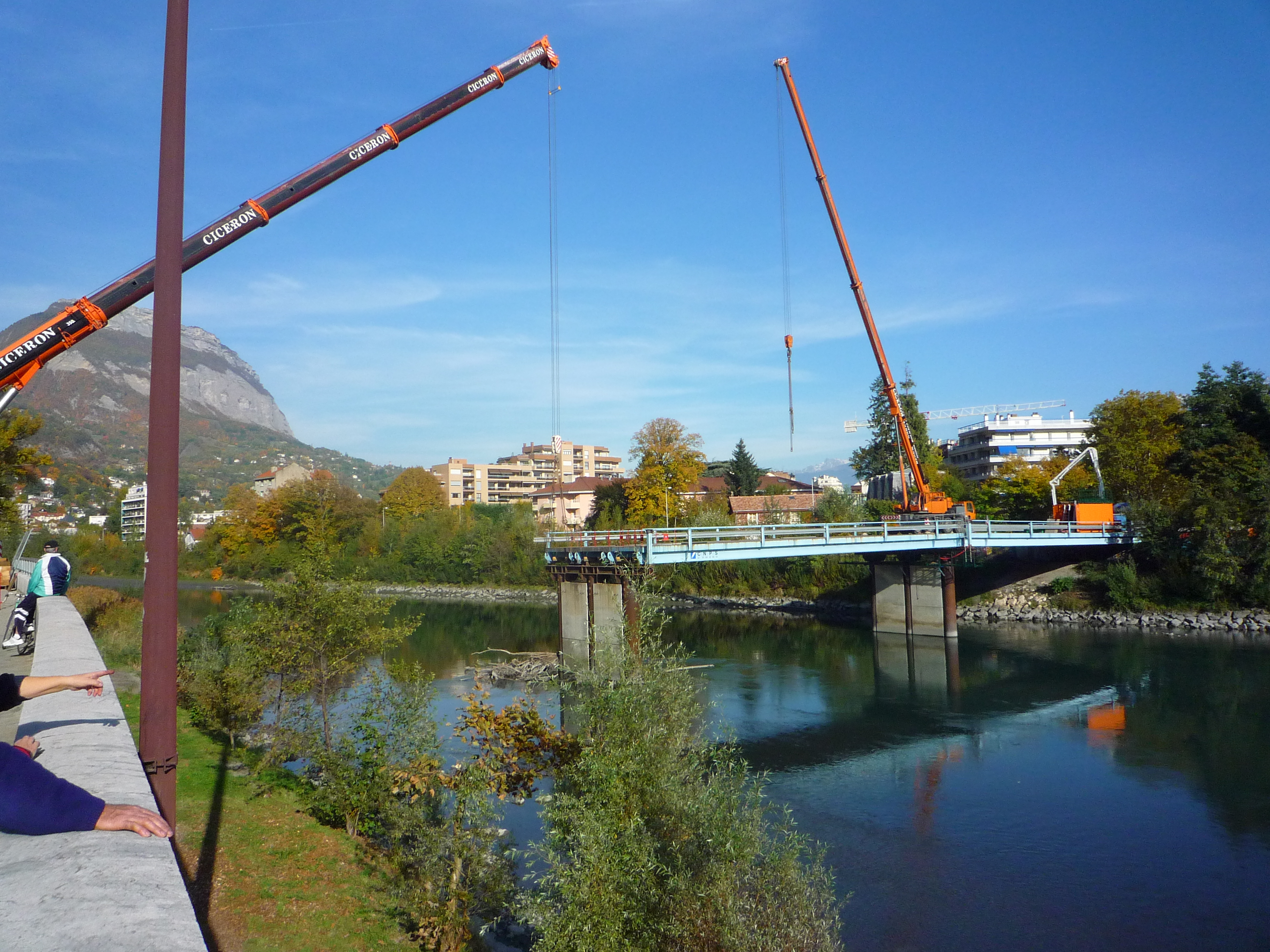 Démolition du pont provisoire en octobre 2009 à Grenoble. Remplacé par le pont de Chartreuse mis en service le 24 janvier 2011.